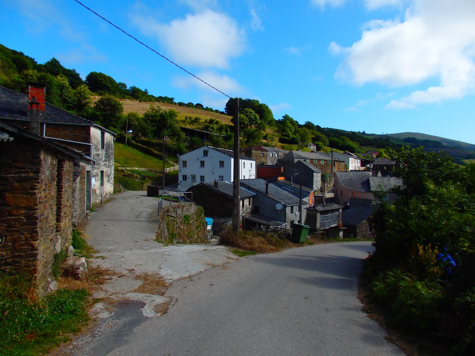 Vista de Lousada, Sasdónigas, Mondoñedo, España